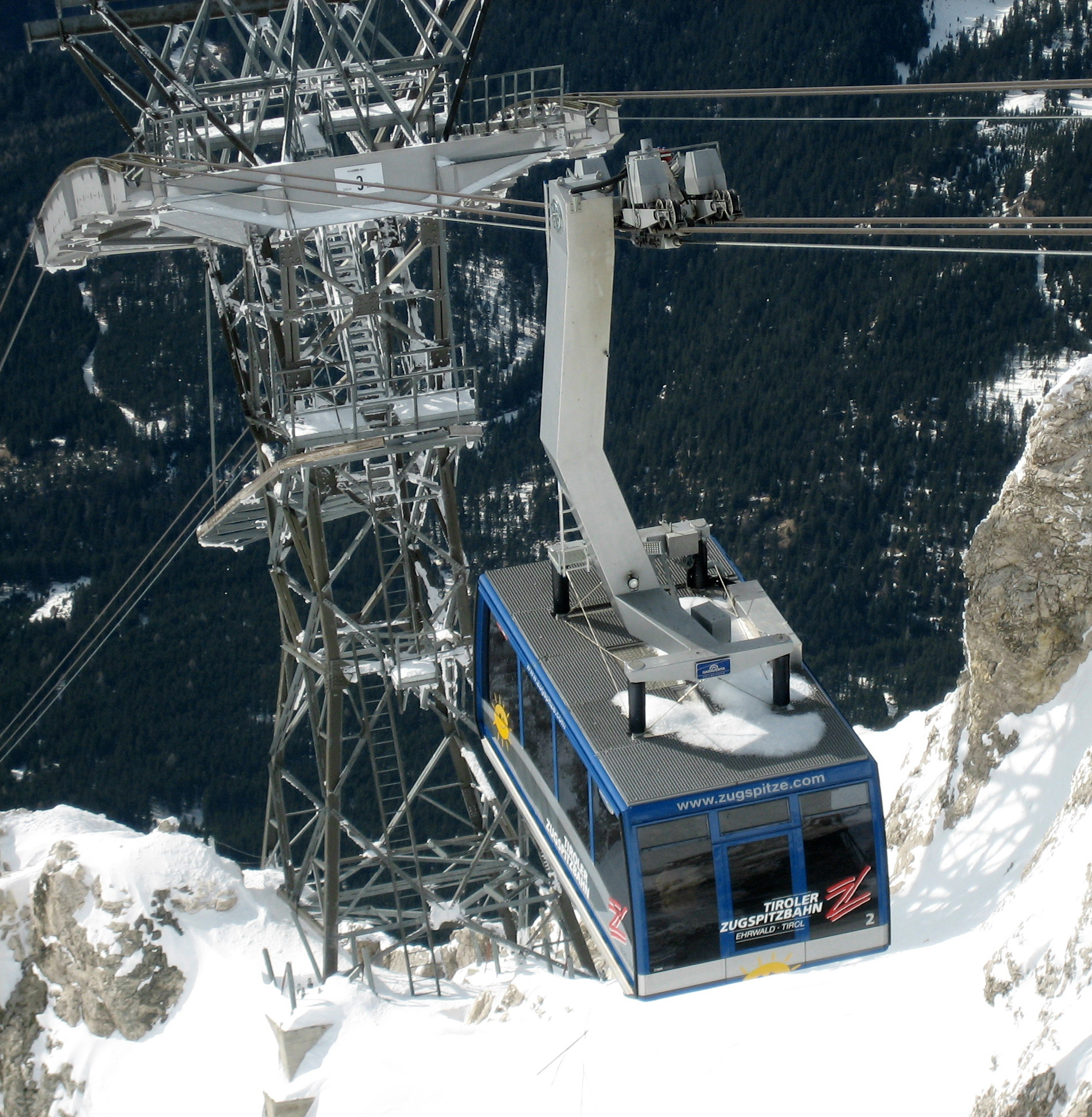 Tiroler Zugspitzbahn; Blick von der Spitze auf die Kabine oberhalb der 3. Stütze (100 Personen Kapazität)